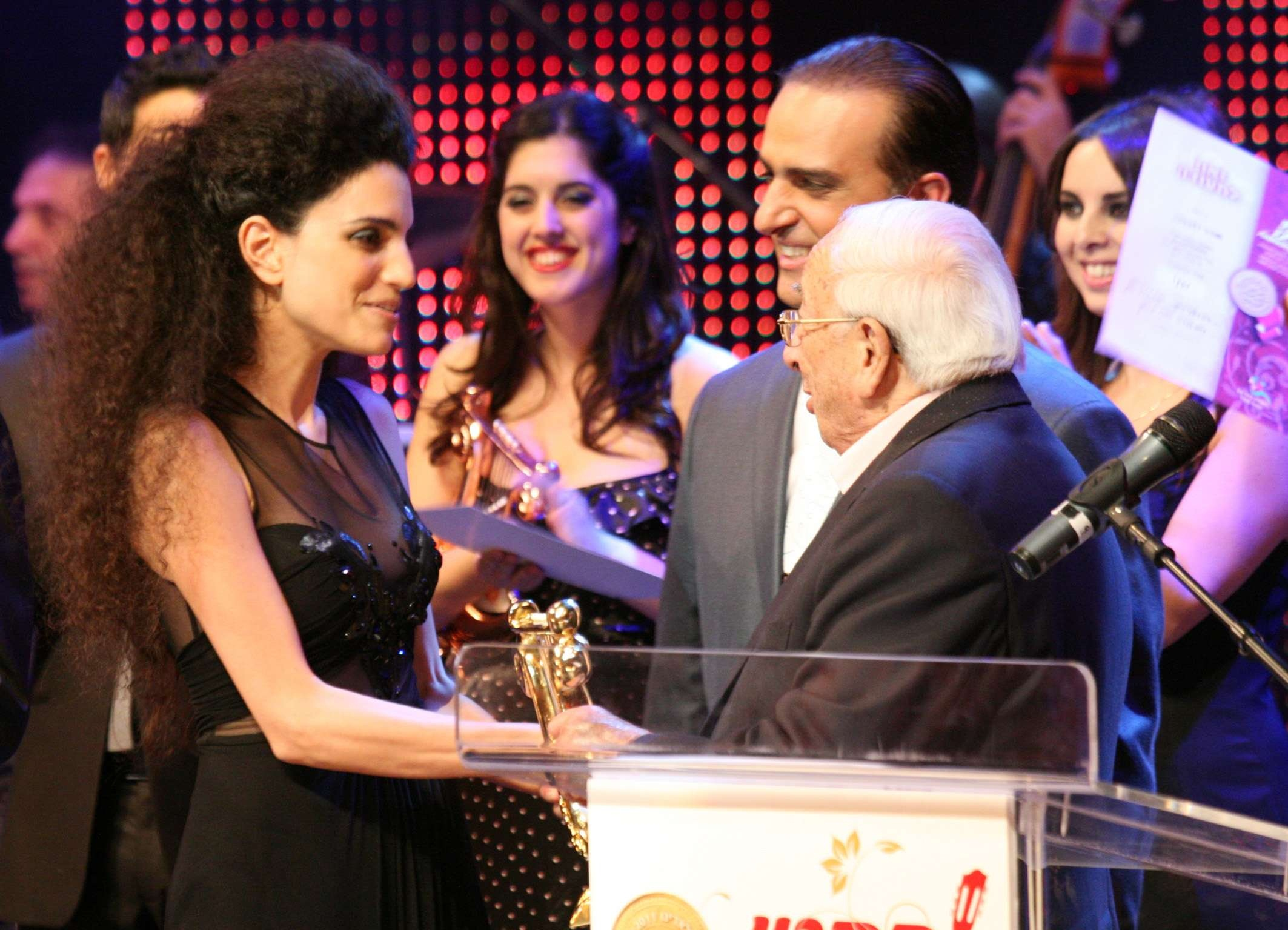 הנשיא החמישי מר יצחק נבון מעניק ליעל בדש את הפרס הראשון על זכייתה בארוע העשור ל"פסטילאדינו"